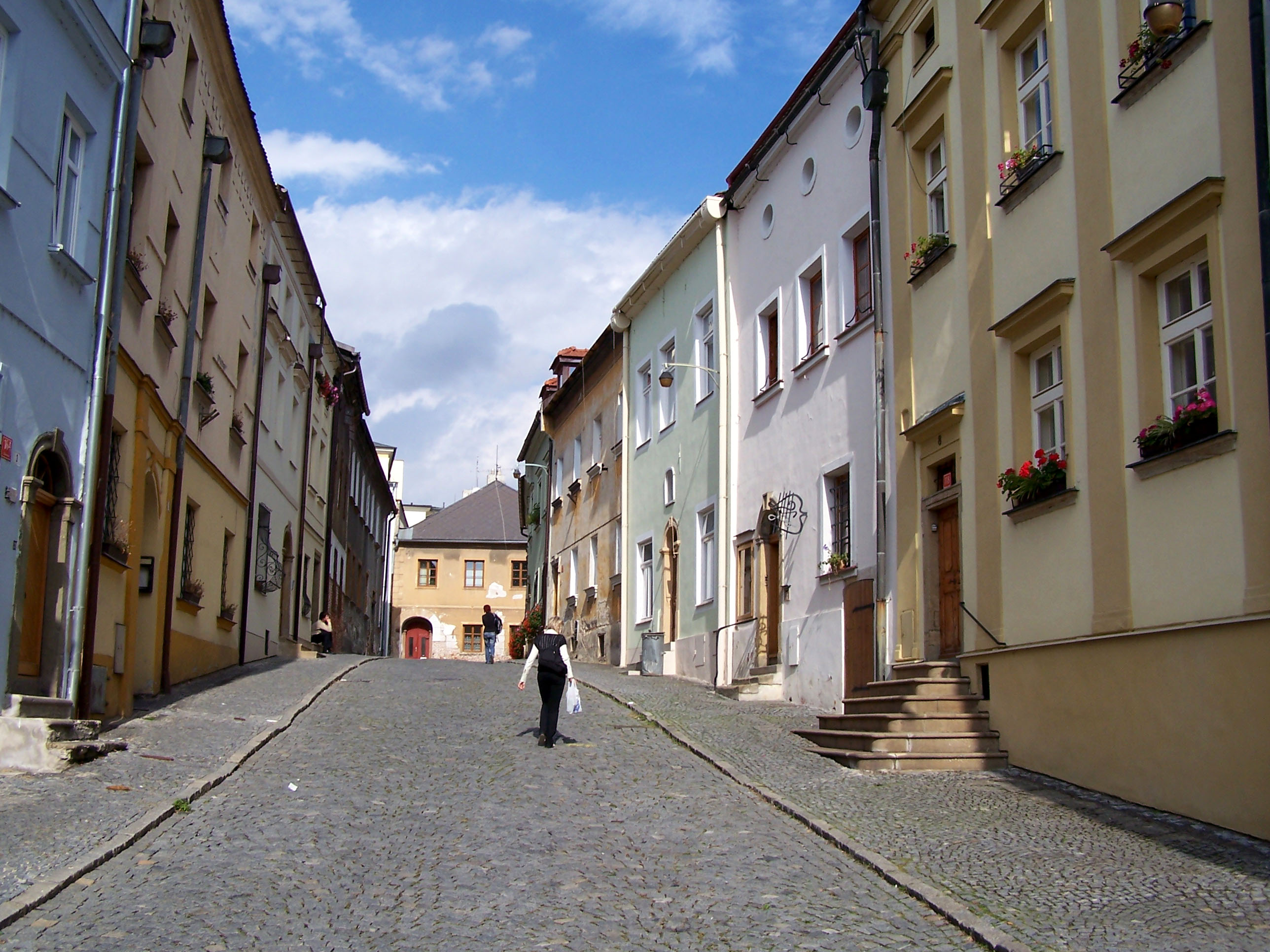 Capuchin (Kapucínská) Street in Olomouc, Czech Republic